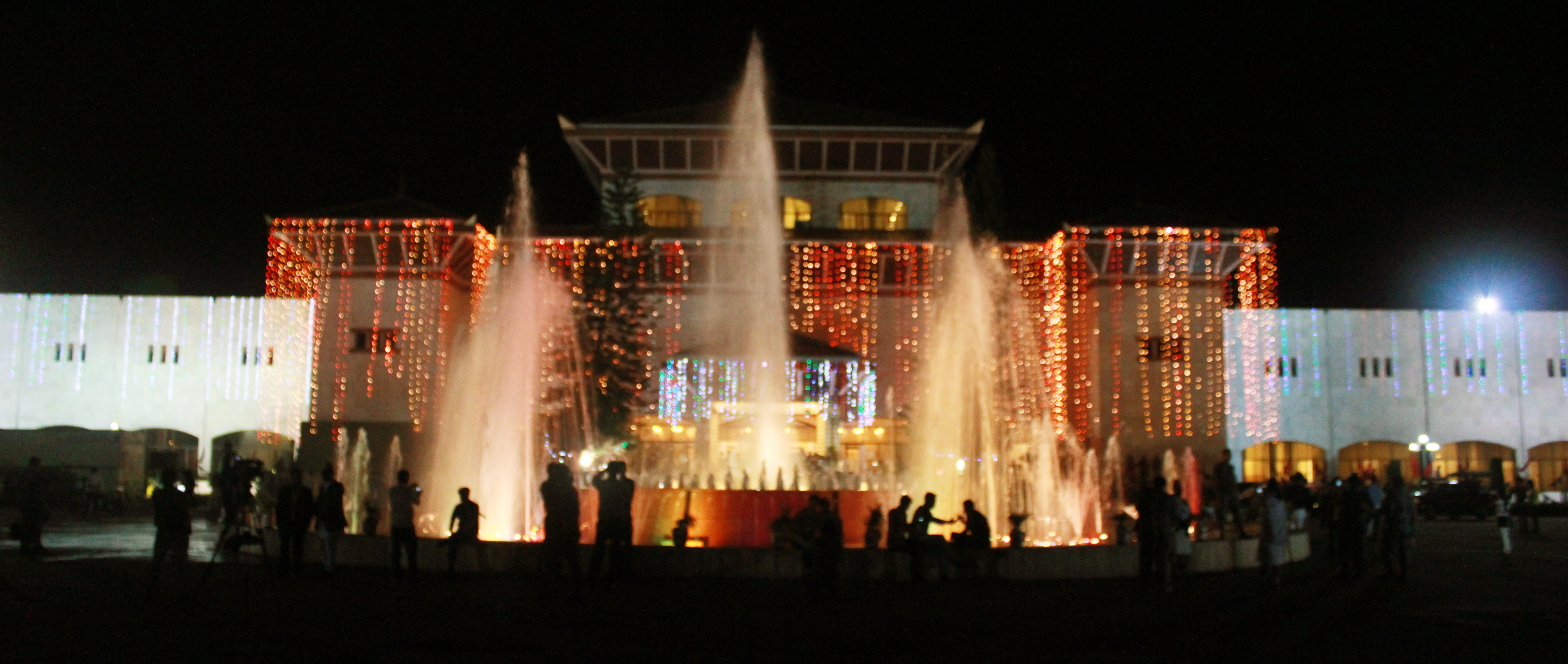 नेपाल भाषा: Aantarastriya Sammelan Kendra, Nepal